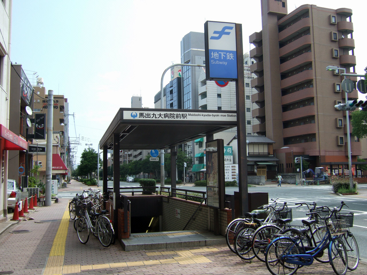 福岡市地下鉄馬出九大病院前駅